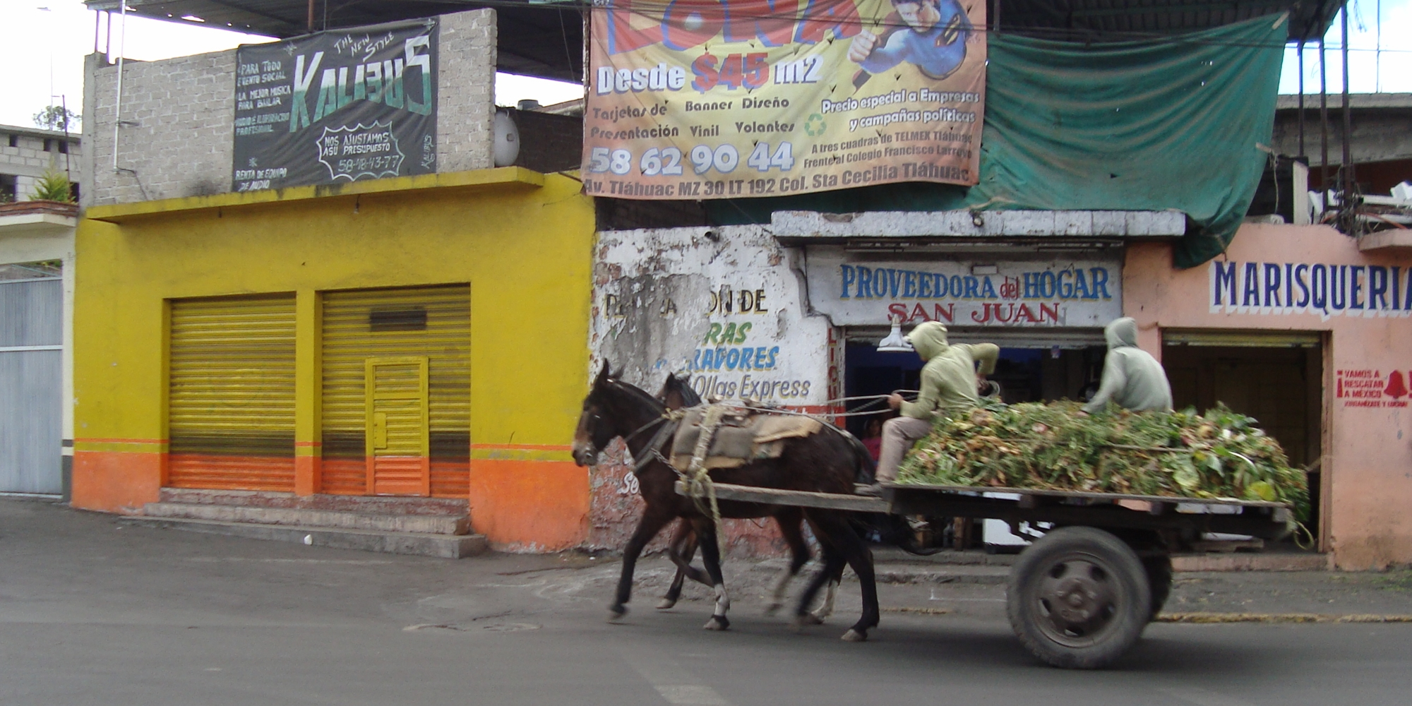 Un par de jóvenes transporta hierbas sobre una carreta jalada por mulas en el centro de San Juan Ixtayopan (México).